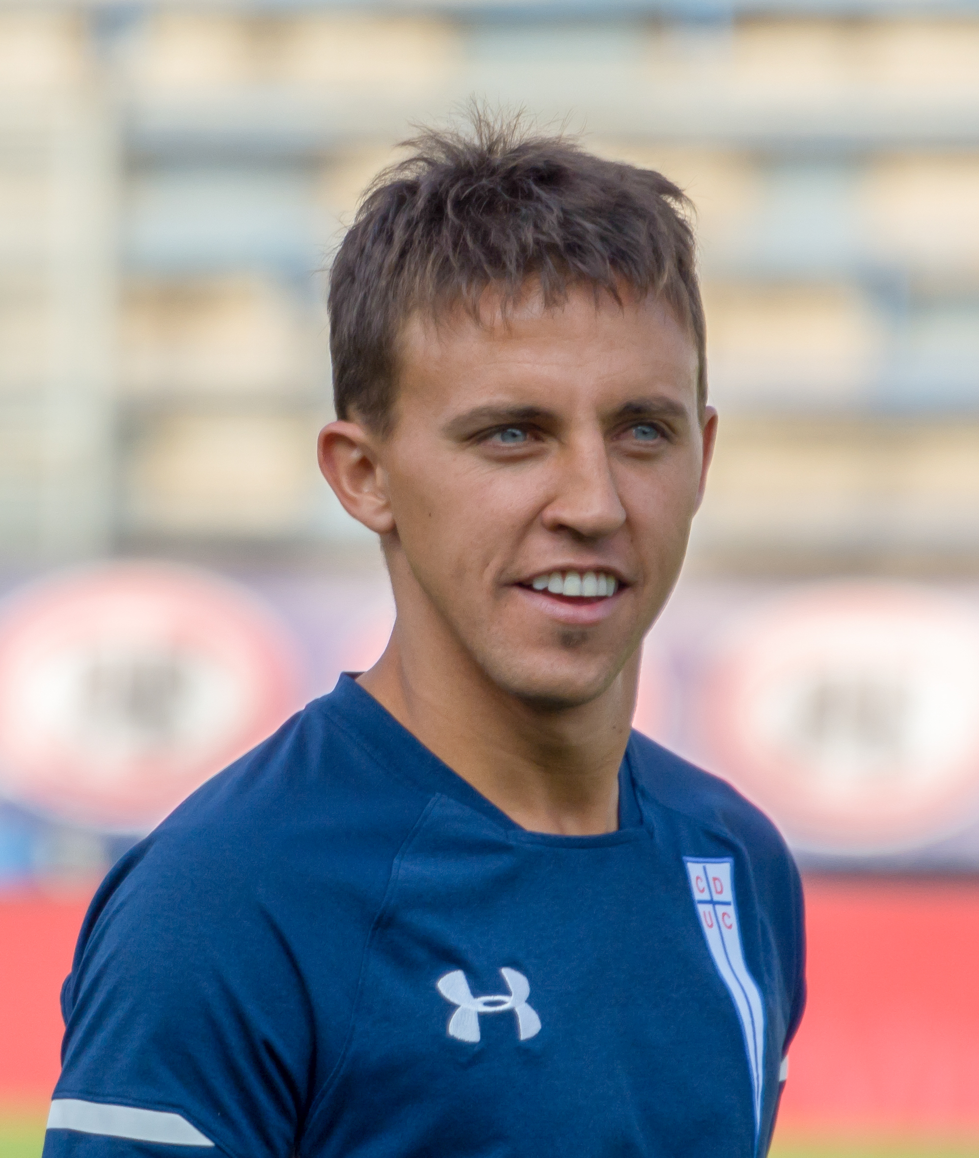 Diego Buonanotte, Universidad Católica v Curicó Unido, Estadio San Carlos de Apoquindo, Las Condes, Santiago, Región Metropolitana, Chile.